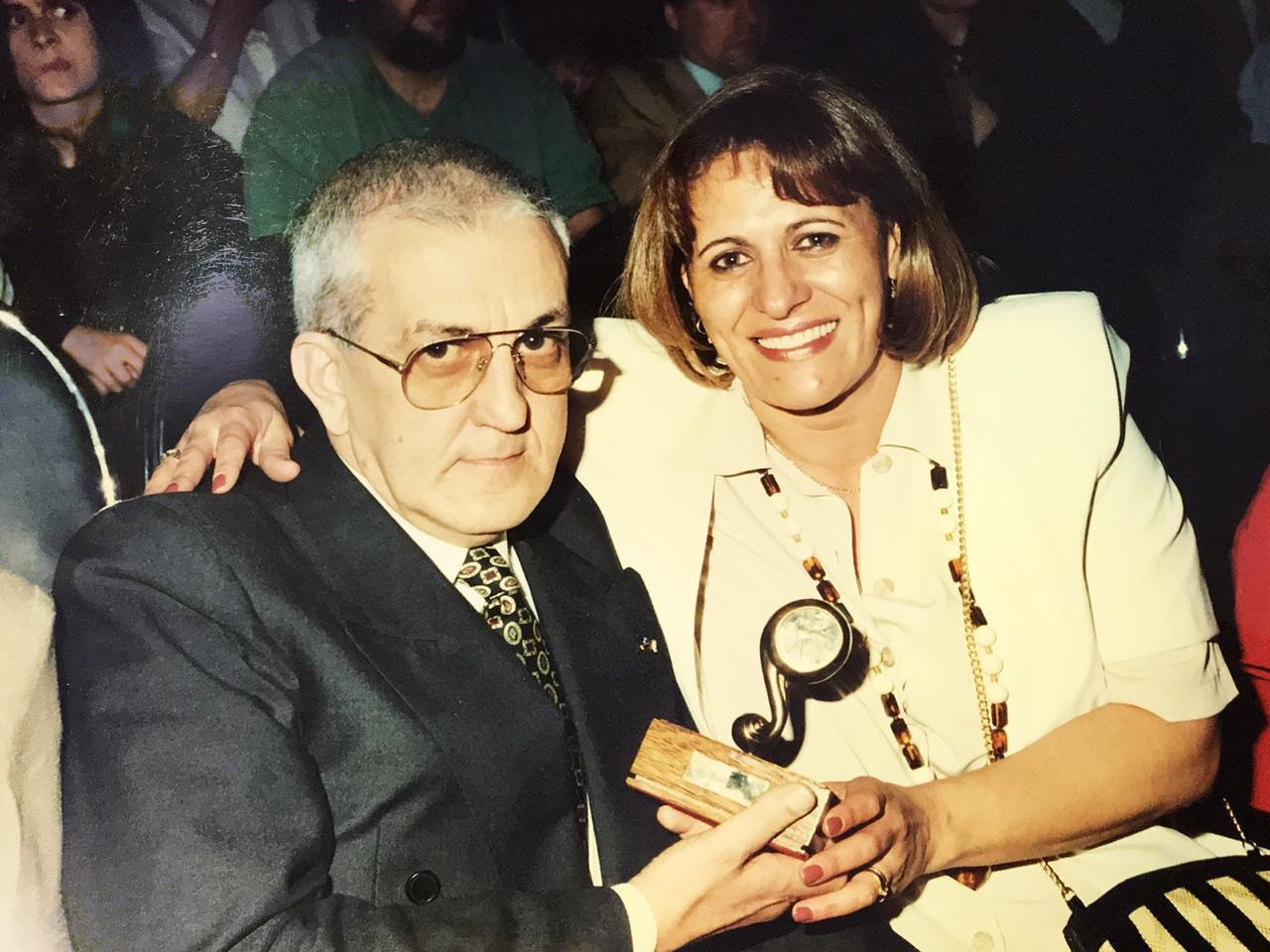 Luis Benito Zamora y su cónguye Marta Alicia Rivero. Ganador del premio Prensario 1994 Mejor Programa de Televisión